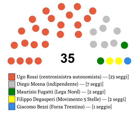 Composizione del Consiglio della Provincia autonoma di Trento.